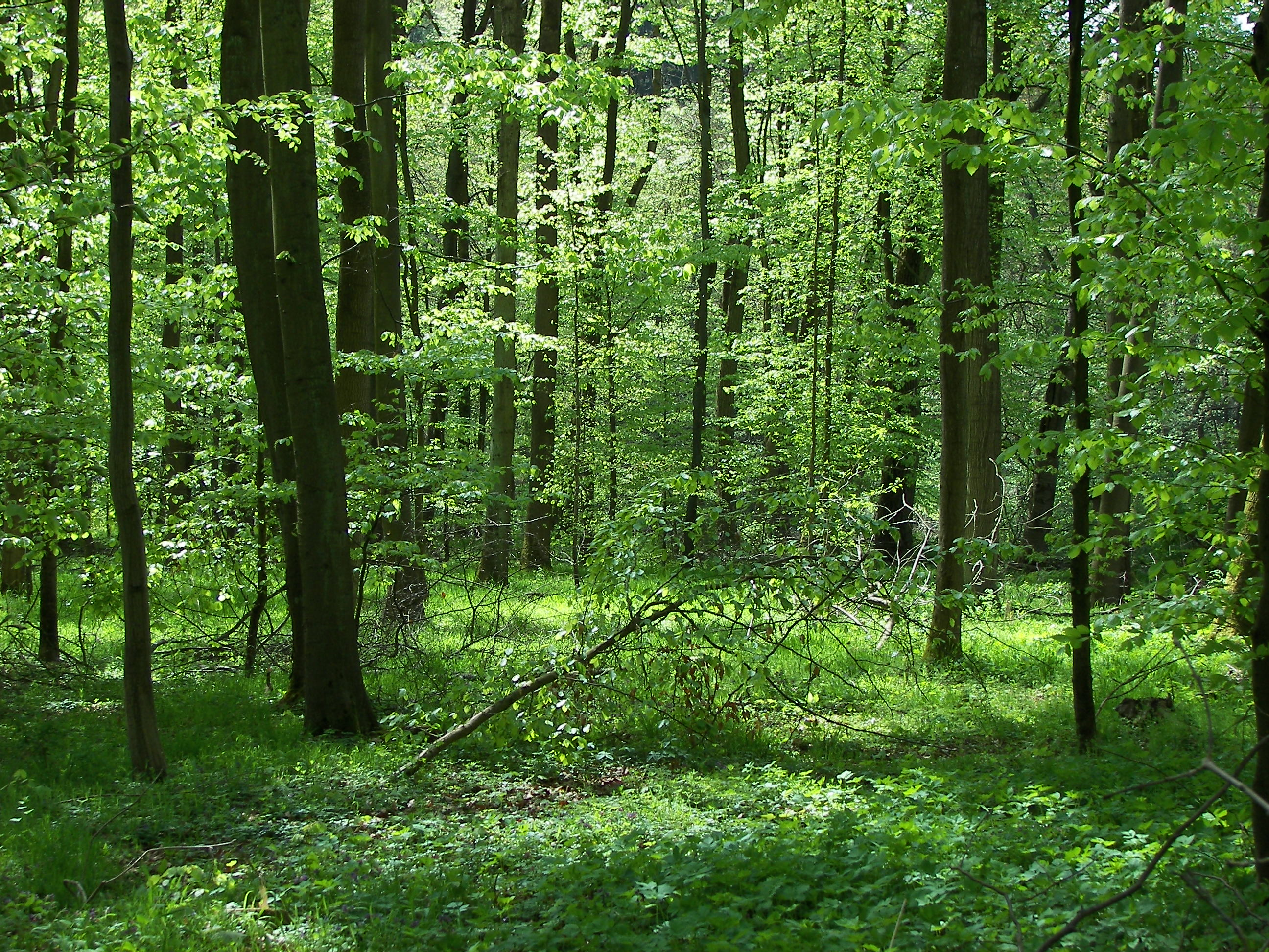 Buchenwald bei Lich in der Wetterau (Löß), Hessen, am 04.05.2006